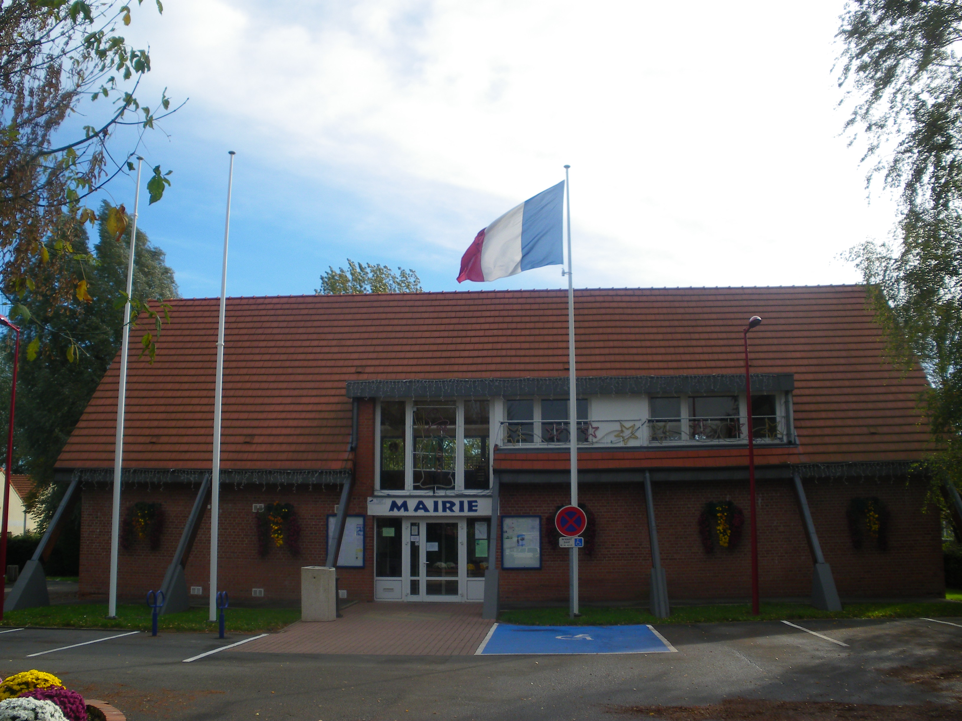 Vue de la mairie de Richebourg.